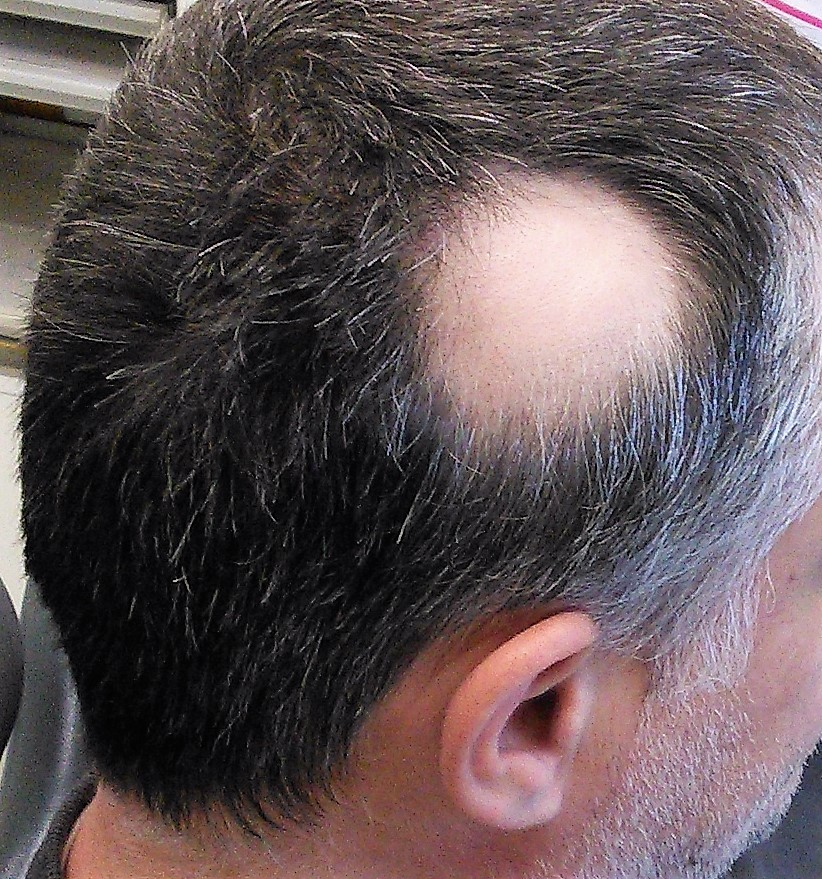 Alopecia areata